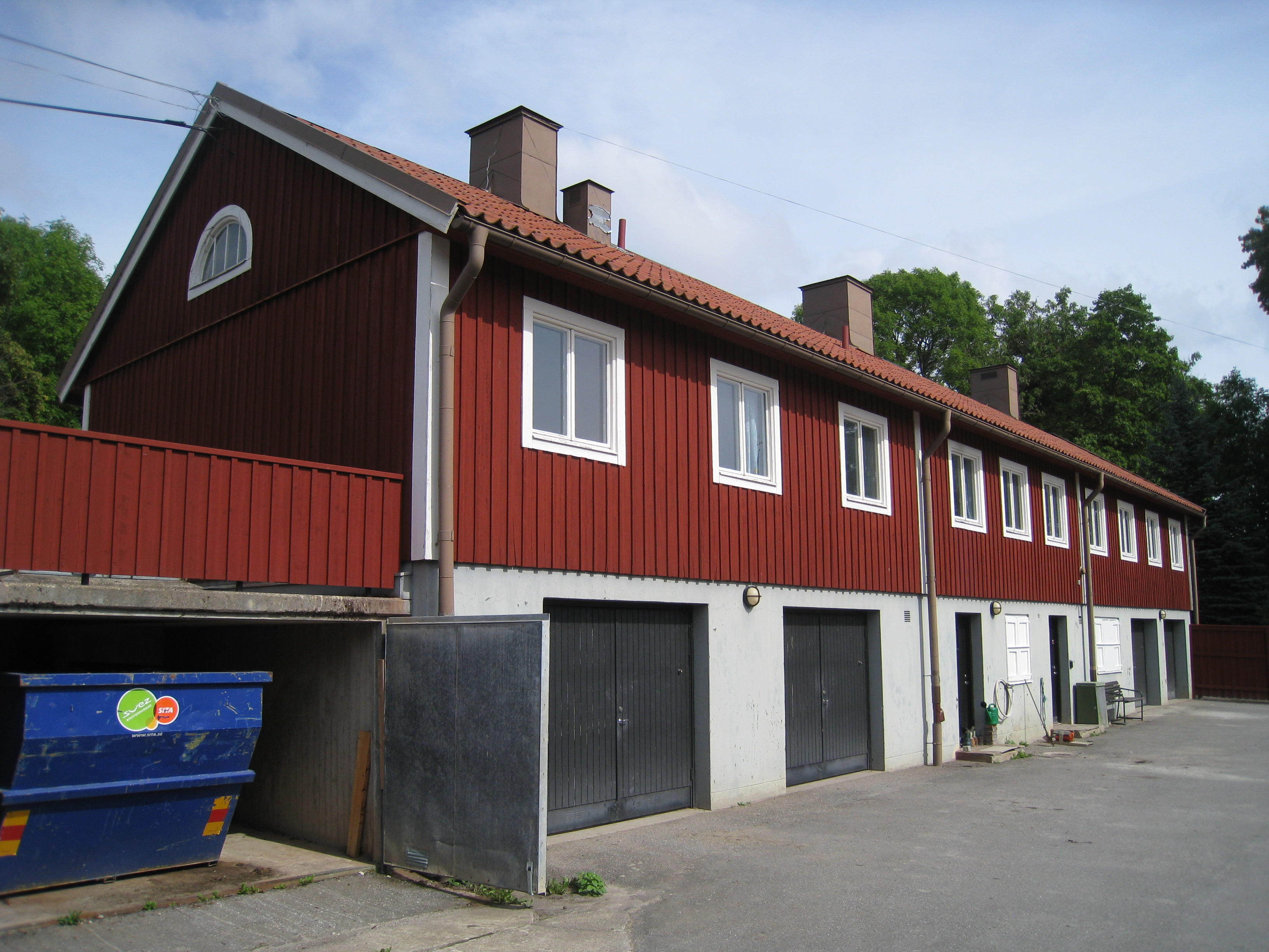 Kyrkogårdsnämndens nya förvaltningsbyggnad från 1961 vid Bromma kyrka, Bromma, Stockholm.